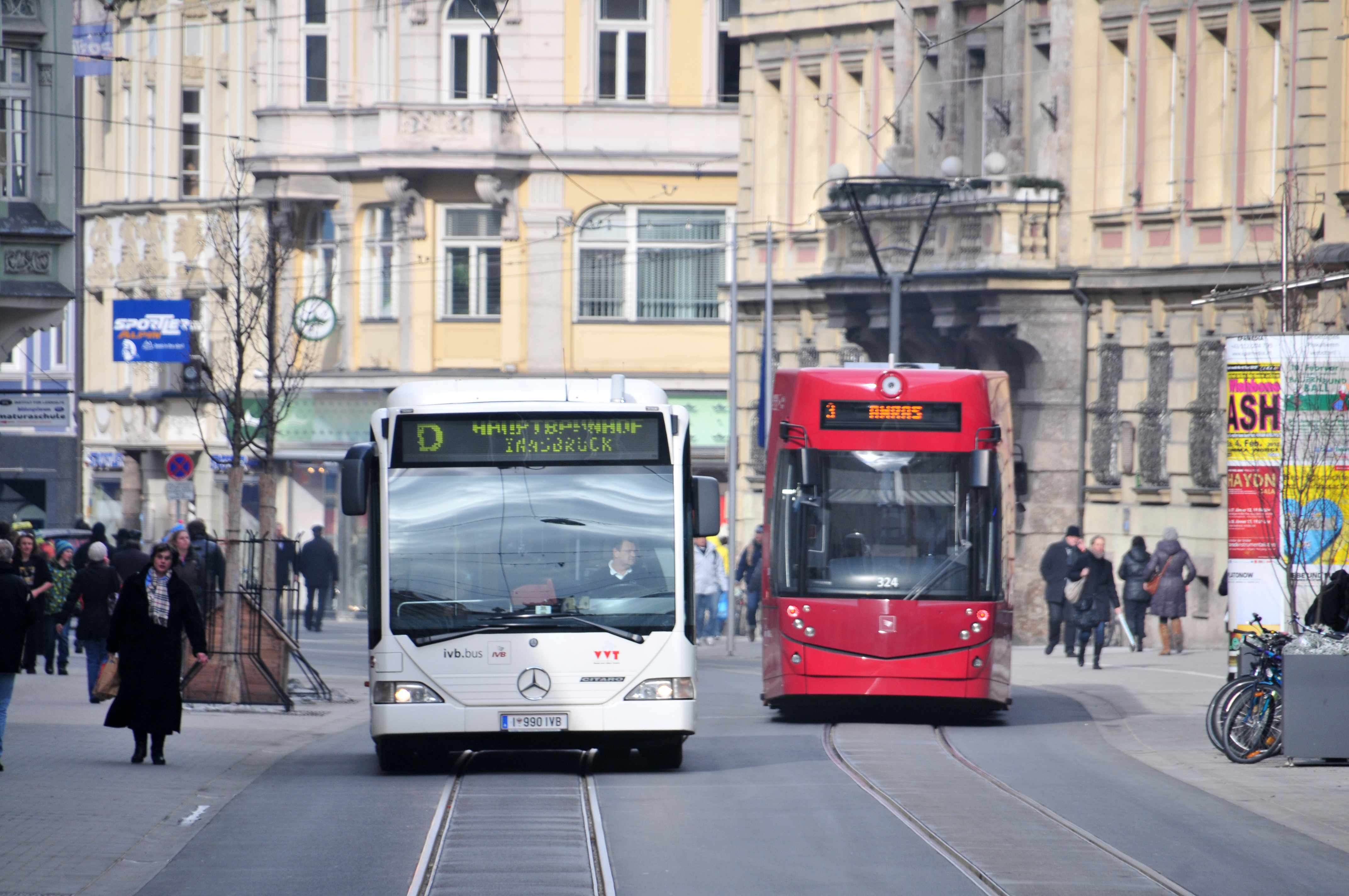 1. Jugendolympiade 2012 Innsbruck Erste Olympische Jugend- Winterspiele 201213. bis 22. Jänner in Innsbruck Dieses Foto wurde durch die Unterstützung von Wikimedia Österreich und die Twoonix Software GmbH ermöglicht.